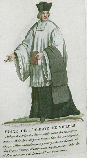 Collection de costumes de tous les ordres monastiques, supprimés à differentes époques, dans la ci-devant Belgique, Bruxelles, Philippe Joseph Maillart et sœur, 1811